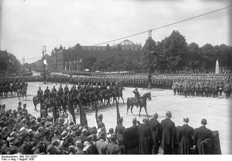 Verfassungsfeier der Berliner Schutzpolizei! Blick über die Verfassungsfeier der Schutzpolizei im Lustgarten in Berlin.